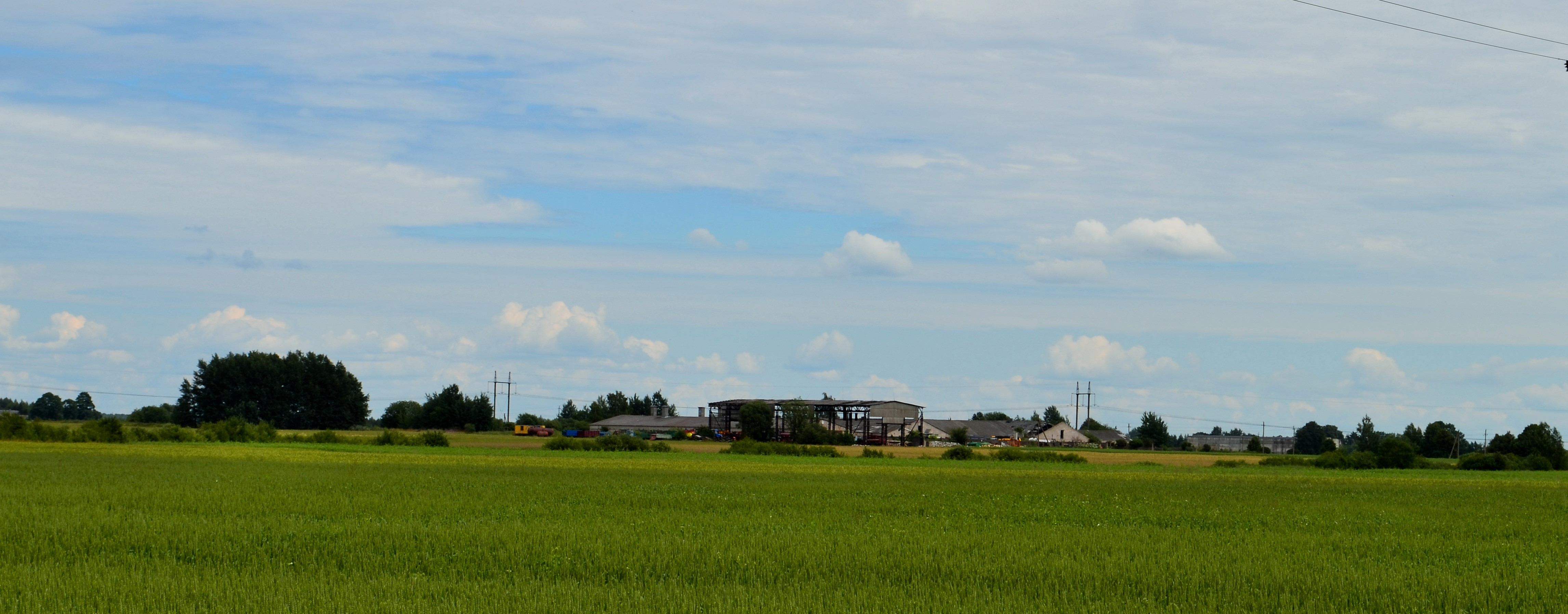 Fermos, Petraičiai, Kėdainių raj.